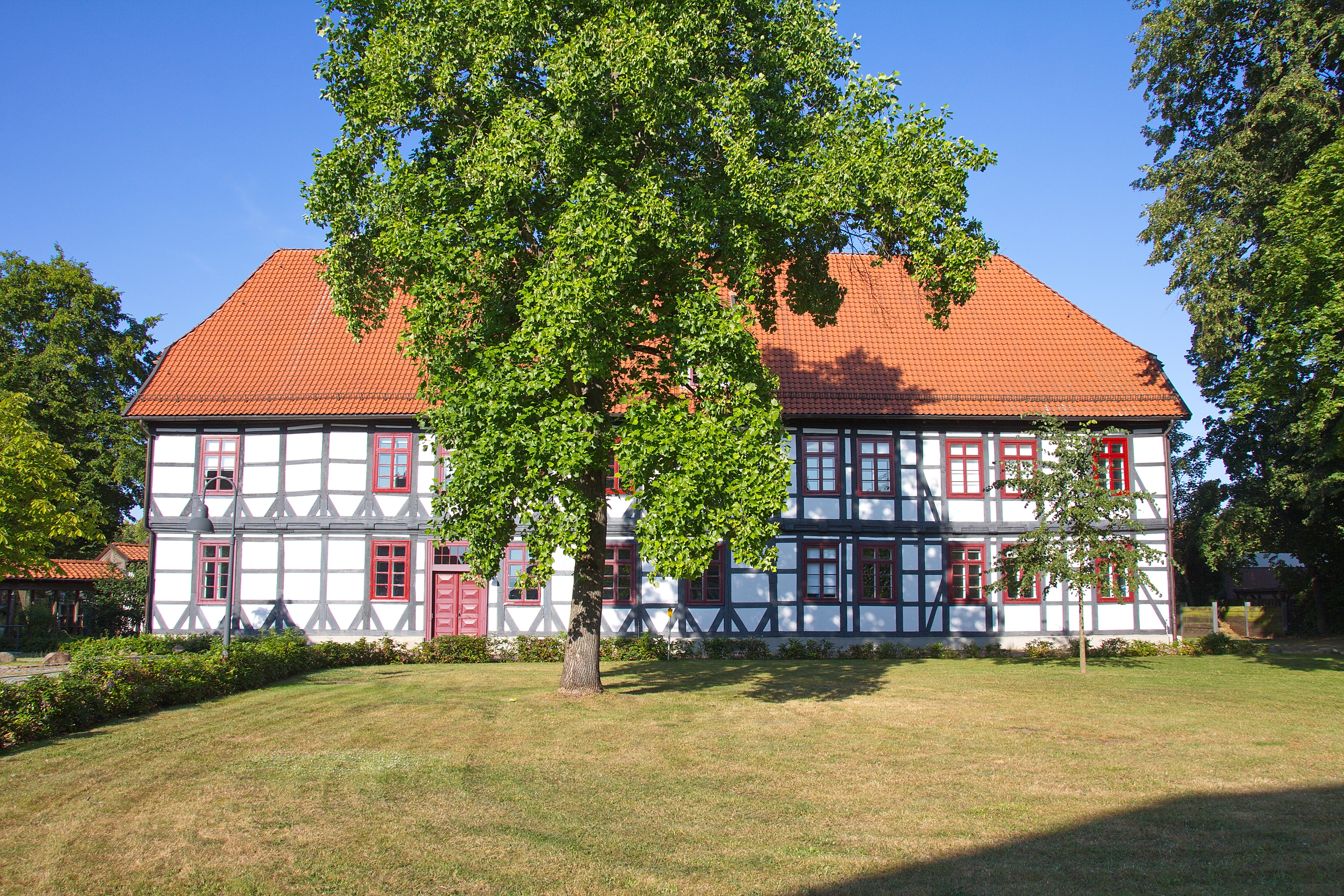 Baudenkmal Amtsgericht Im Klint 4 in Großburgwedel (Burgwedel)